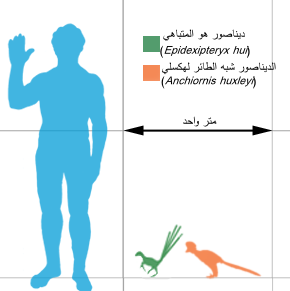 مُقارنة بين حجمي ديناصورين لا طيريين صغيرين، Epidexipteryx hui (الأخضر) وAnchiornis huxleyi (البرتقالي) مقارنة بحجم إنسان مربوع. تم وضع حجم Anchiornis استنادًا على أضخم العينات الموصوفة وصفًا علميًا، وهي العينة LPM-B00169. أما Epidexipteryx فتمّ وضع حجمه بناءً على الحجم المُقدّر للنوع ككل وحجم العينة الوحيدة التي عُثر عليها، وهي العينة IVPP V15471. إن طول ريشات الذيل عند كلا الديناصورين هو طولٌ تخميني.